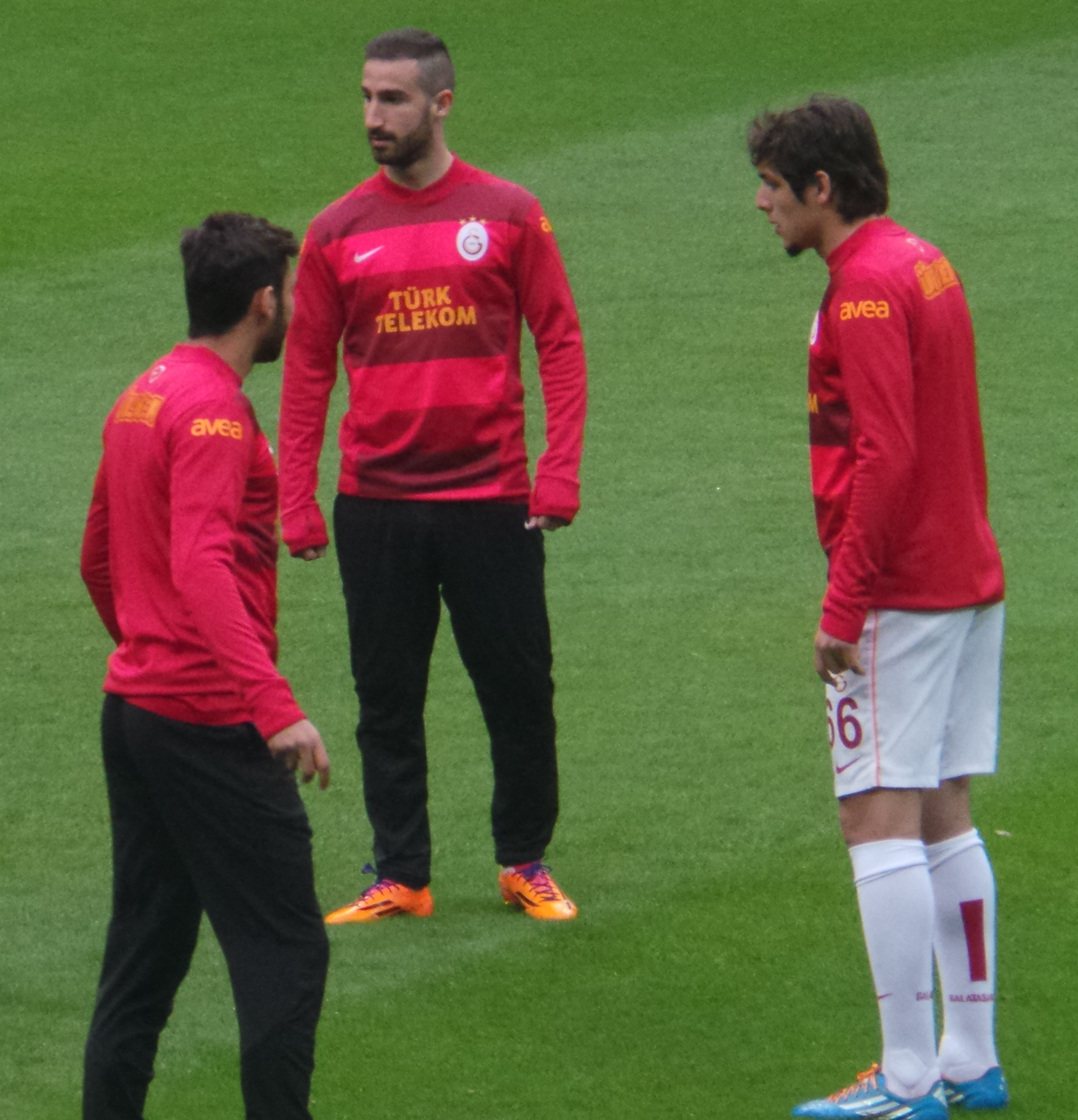 Galatasaray'ın 2013-14 devre arasında yaptığı yerli transferler Salih Dursun, Umut Gündoğan ve Veysel Sarı